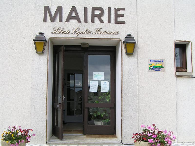 mairie de Londigny en Charente